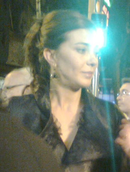 Núria Prims als III Premis Gaudí